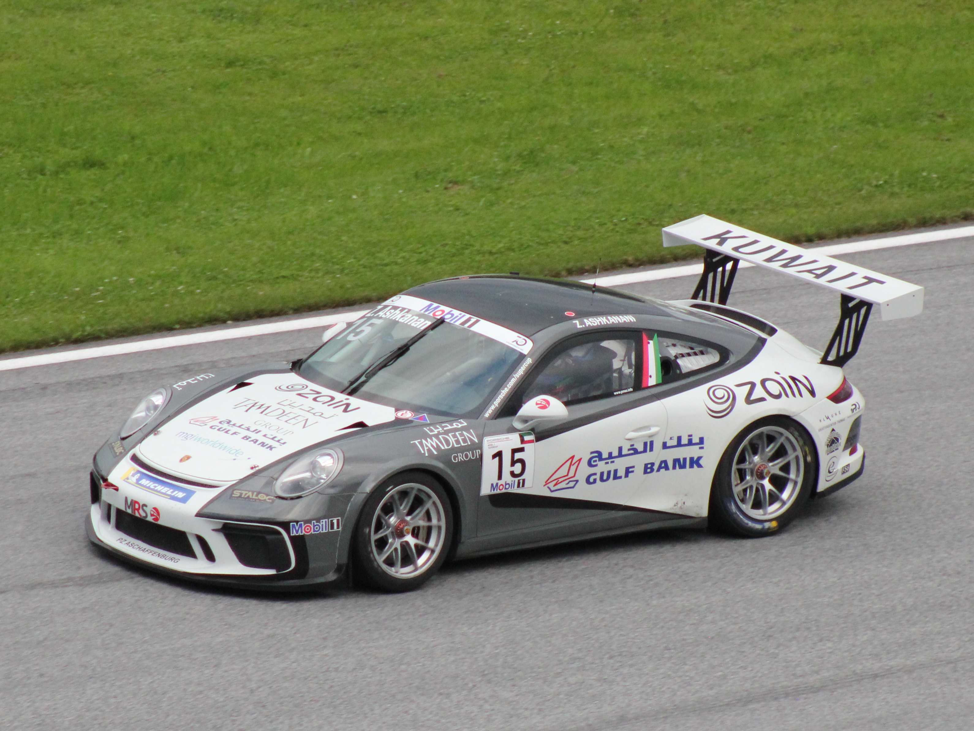 15 Zaid Ashkanani beim Rennwochenende in Österreich 2018